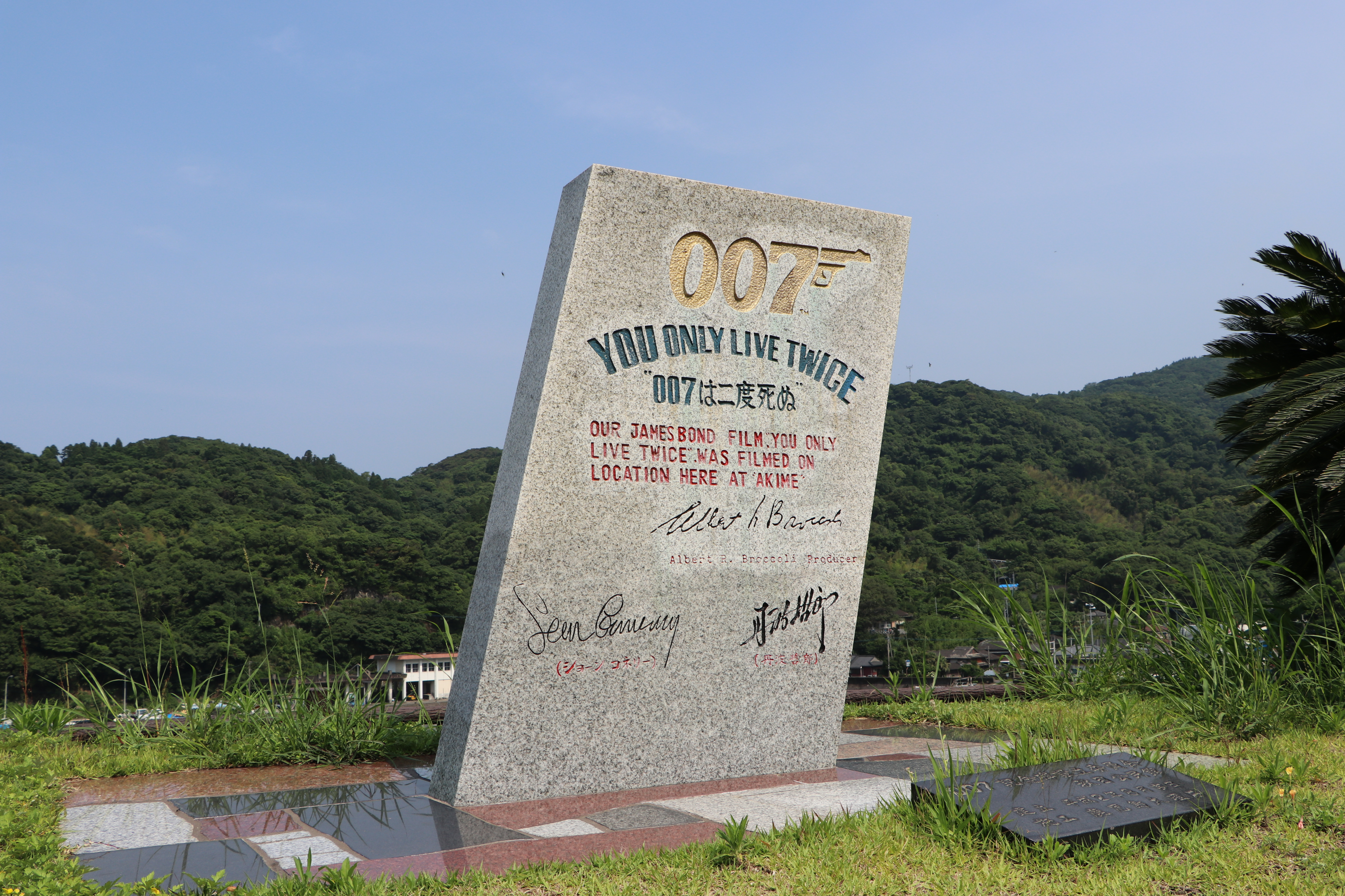 坊津町秋目にある007は二度死ぬの撮影記念碑。 Canon EOS 80D